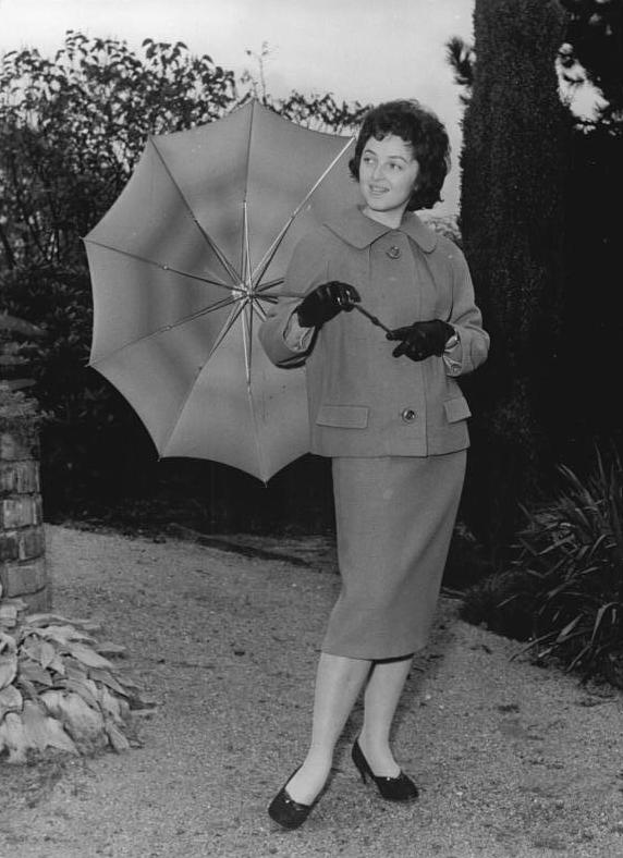 Zentralbild-Löwe Frö-Qu 23.10.1958 Zur Vorbereitung der Wahlen: Kleiner Betrieb mit großen Zielen. Mit einem Sonderwettbewerb, durch den der Jahresplan bis zum 15. November um 90 Prozent erfüllt werden soll, hat die Belegschaft des kleinen volkseigenen Betriebes Bekleidungswerk Radeberg ihre Wahlvorbereitung verbunden. Die 135 Arbeiter und Arbeiterinnen des Werkes haben sich die Aufgabe gestellt, bis zur Wahl 15.700 Damenmäntel, Kostüme und Röcke fertigzustellen. Grundlage des Wettbewerbes ist der bis auf den einzelnen Arbeiter aufgeschlüsselte Plan. Eingeschlossen in den Wettbewerb ist auch die restlose Erfüllung des zusätzlichen Massenbedarfsgüterprogramms 1958 bis zum Tage der Wahl. UBz.: Modernes Kleid mit Jacke aus Steichgarnwolle aus dem VEB Bekleidungswerk Radeberg.